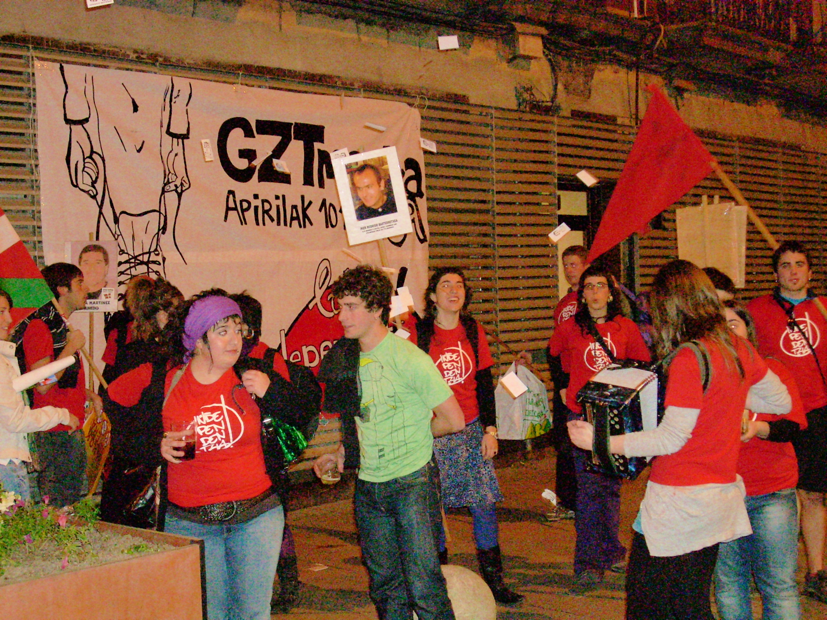 Triki poteoa Erandion.